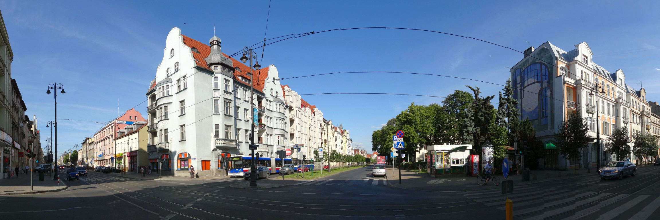 Ulica Gdańska w Bydgoszczy